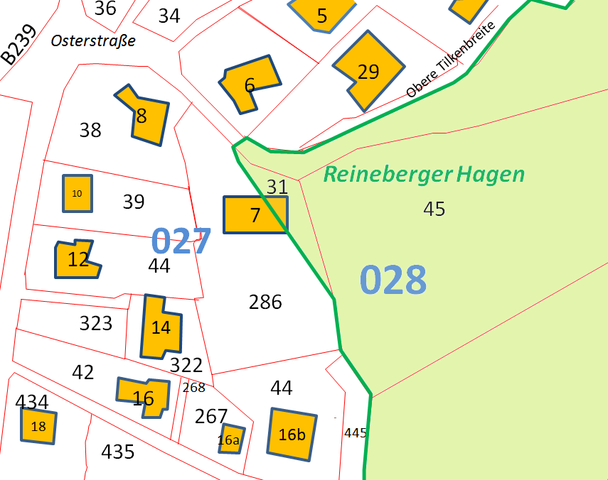 Auszug aus der Leigenschaftskarte